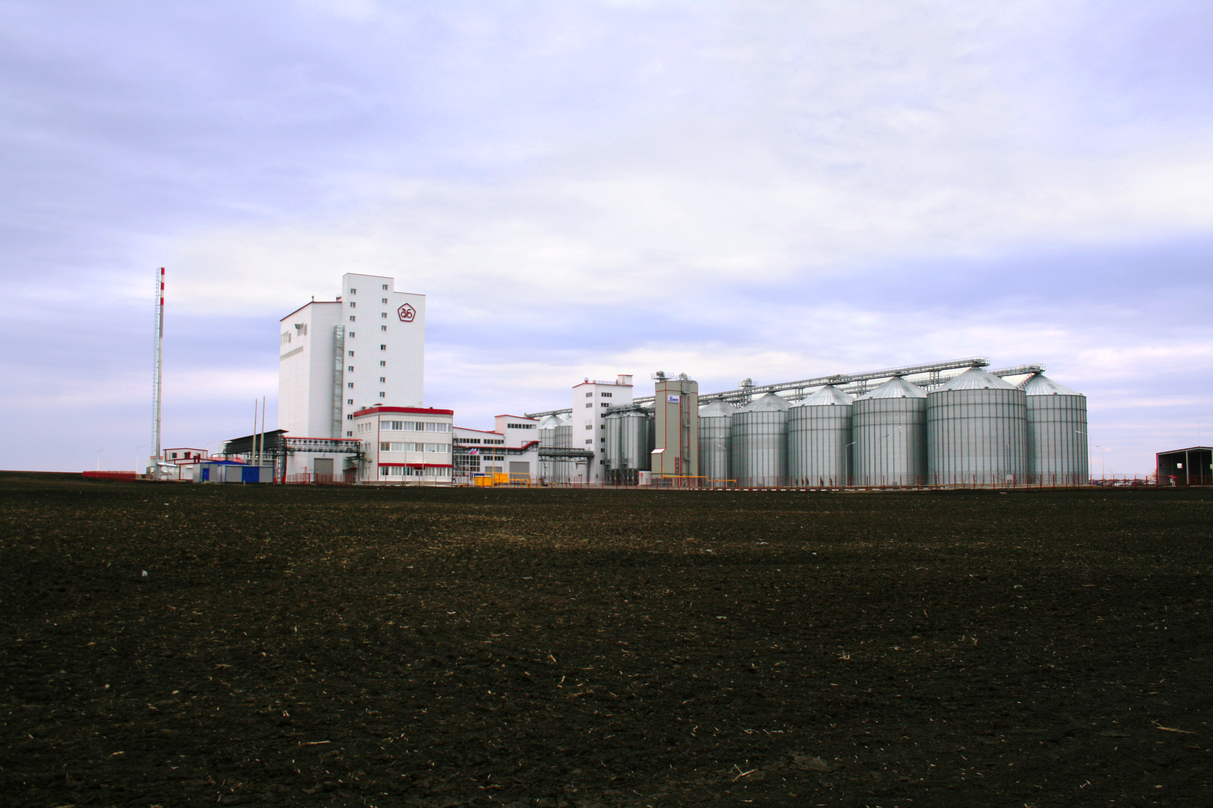 Яковлевский комбикормовый завод. Входит в группу компаний «Агро-Белогорье».